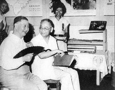 1956年欧阳予倩与梅兰芳